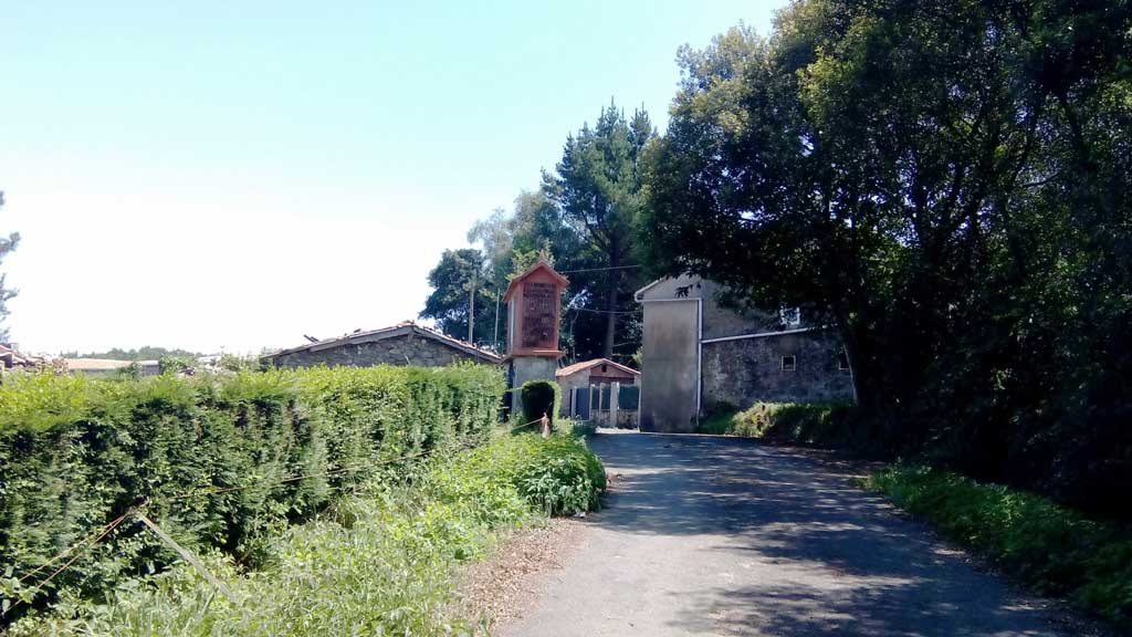 Vista Quintadóniga, Curtis.